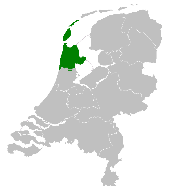 Verspreiding West-Friese dialect